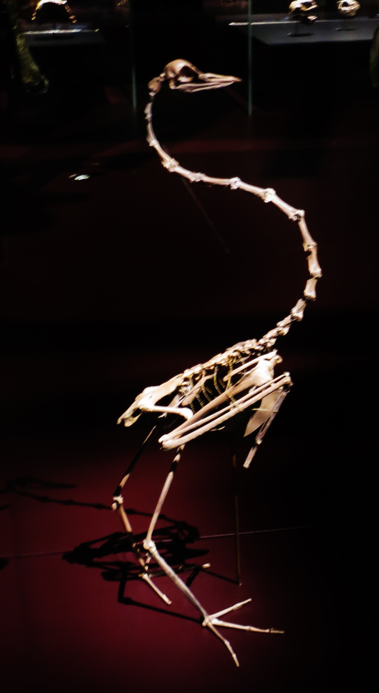 Fossil - Took the picture at Musee des Confluences, Lyon